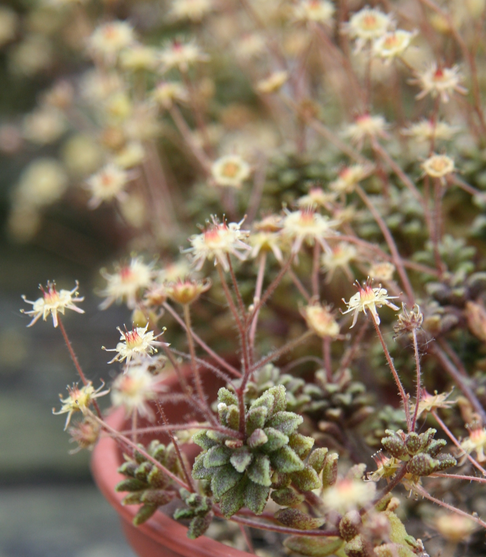 Monanthes muralis in Blüte in der Gärtnerei Flores-Reinecke, Leverkusen